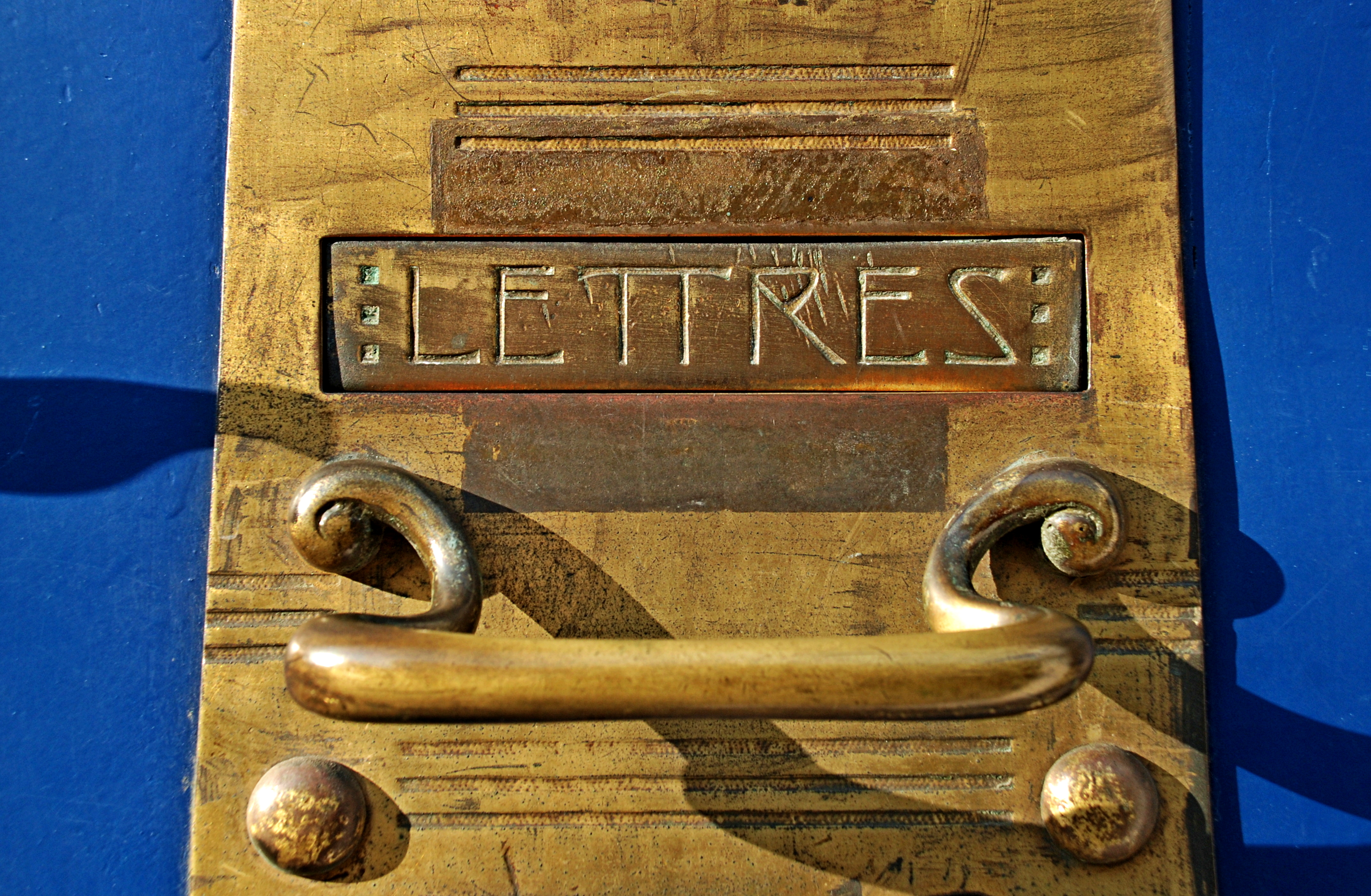 Belgique - Bruxelles - Maison-atelier du peintre Paul Verdussen (Art nouveau géométrique, architecte Paul Hamesse, 1901)